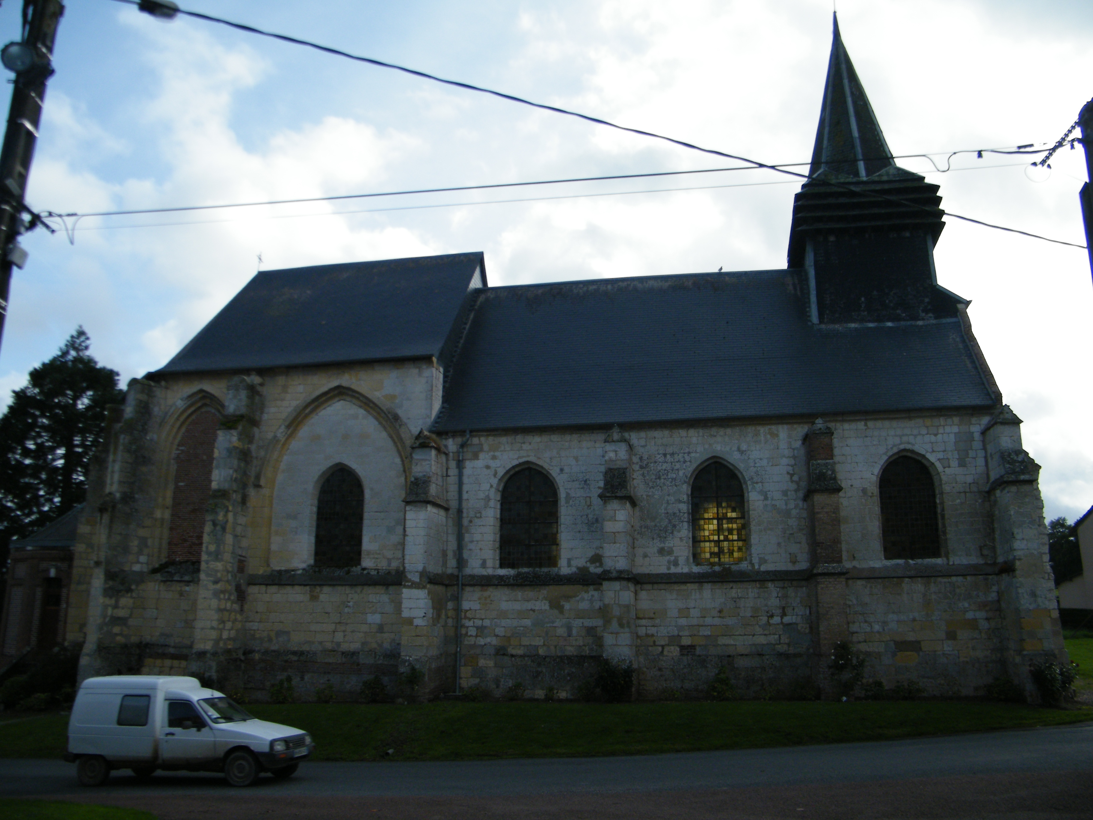 église.